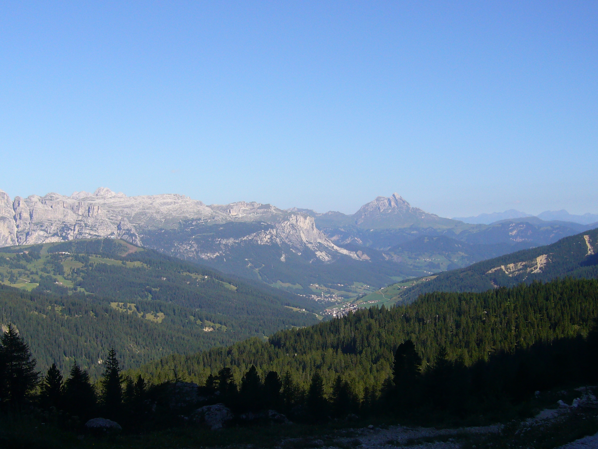 Val Badia vista dal Passo di Valparola